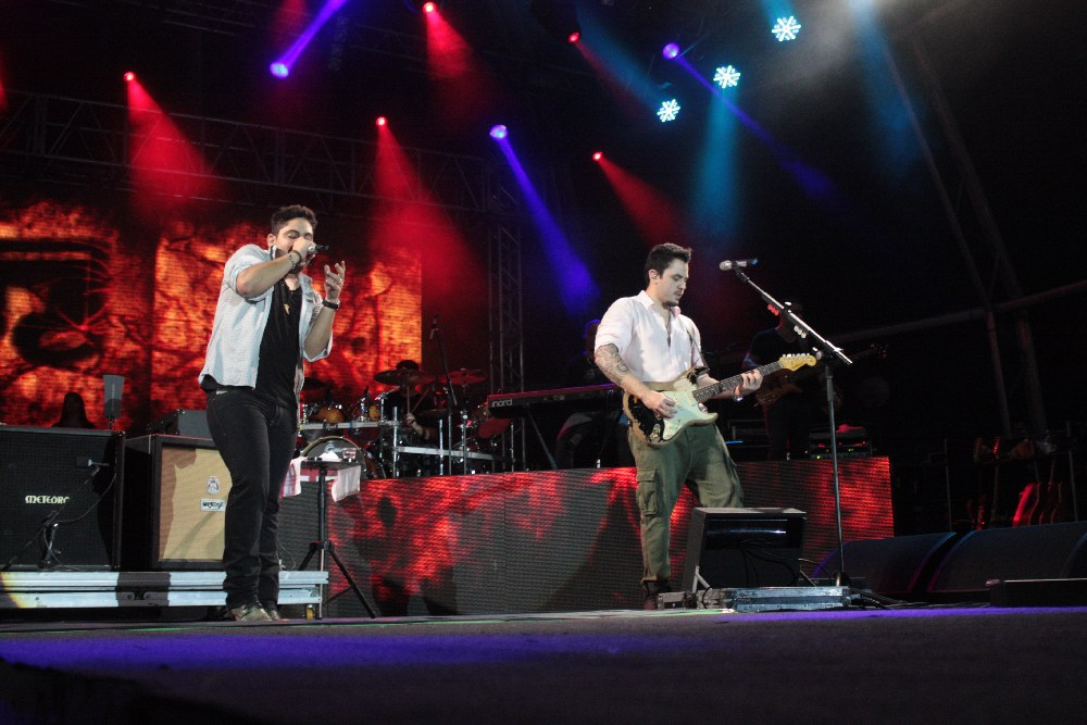 A dupla Jorge & Mateus encerrou a noite do Arraia da Cerveja & Cia em Santo Antônio de Jesus, interior da Bahia.